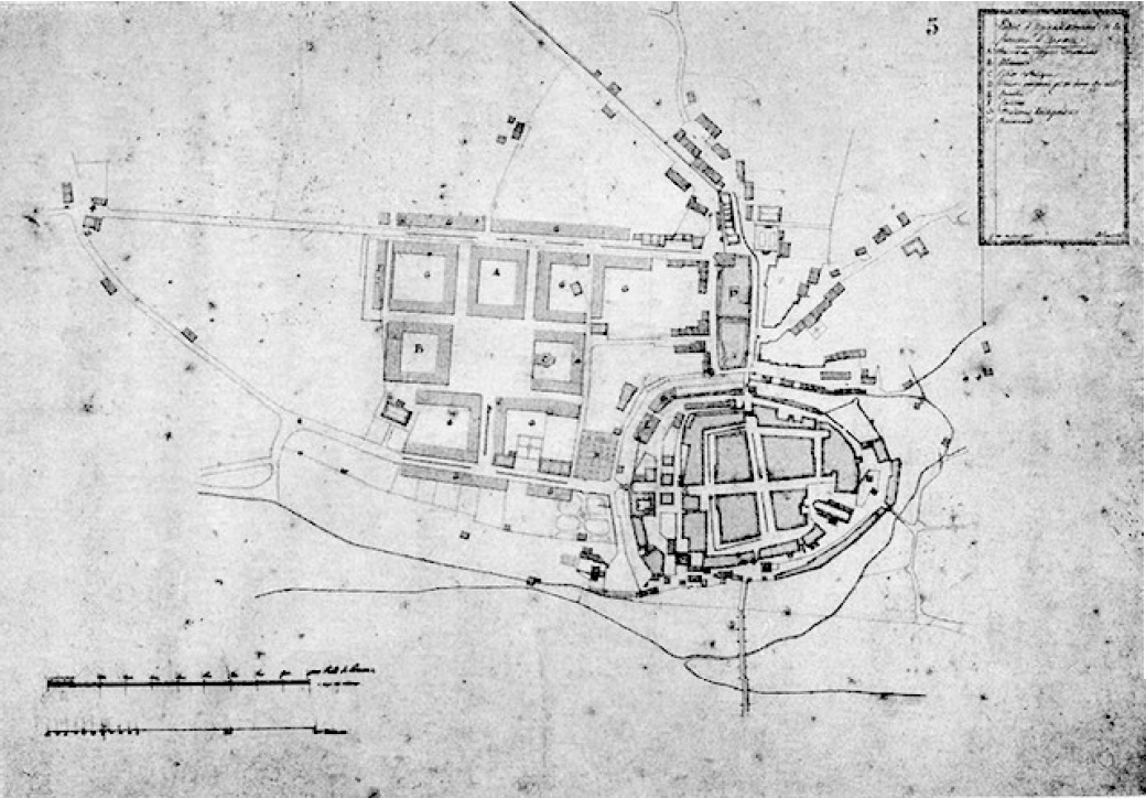 "Plan d'agrandissement de la commune d'Aarau". Johann Daniel Osterrieth (* 9. Oktober 1768 in Straßburg, Elsass; † 25. Juli 1839 in Bern) war ein Architekt des Klassizismus. Er war Berner Stadtbaumeister.